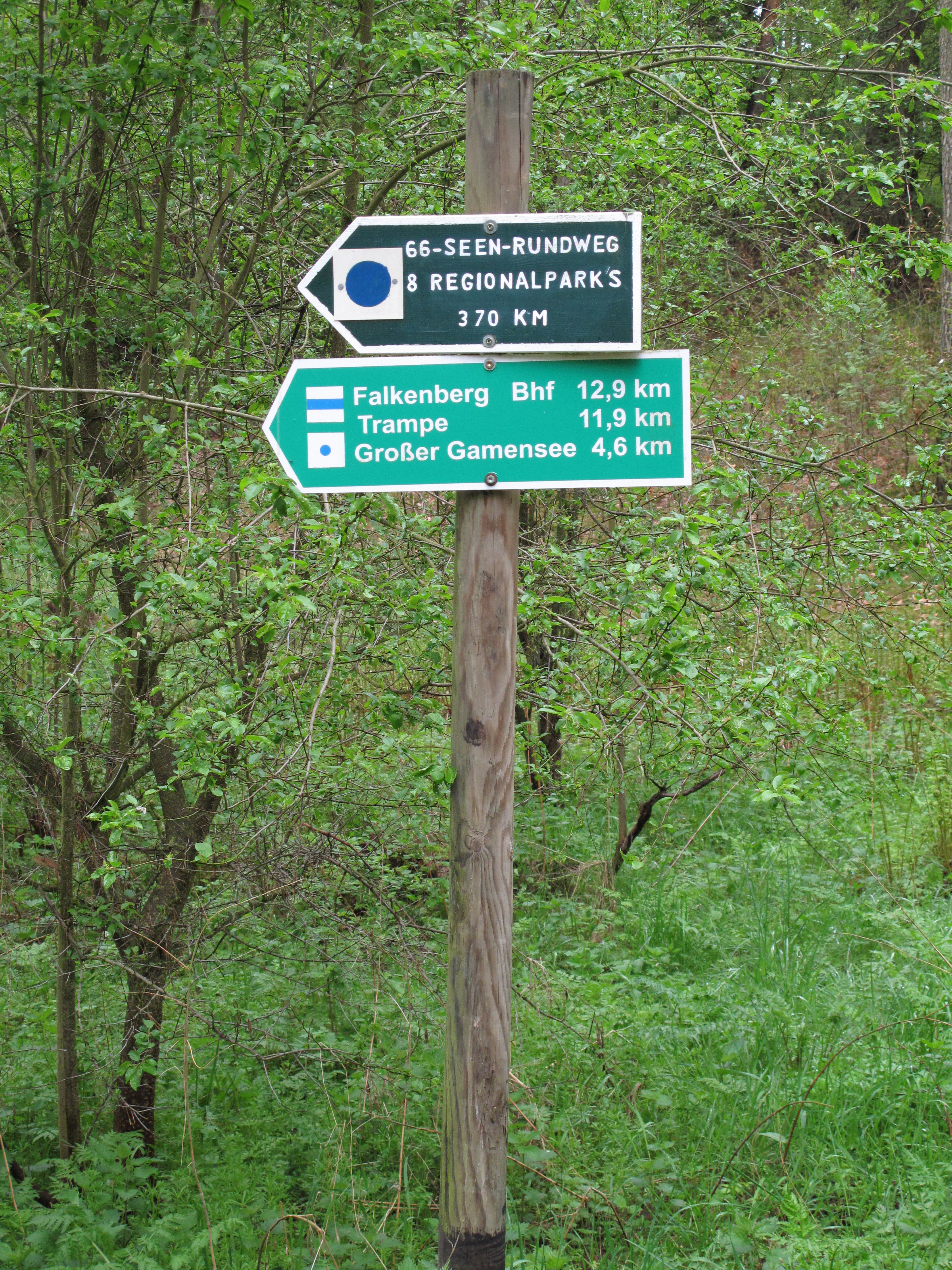 66-Seen-Regionalparkroute-Wegweiser mit Symbolzeichen für den Weg.